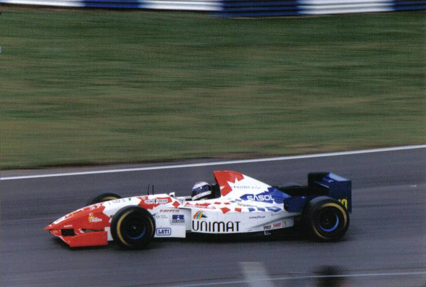 Taki Inoue lors du Grand Prix de Grande-BRetagne 1995 sur Footwork FA16